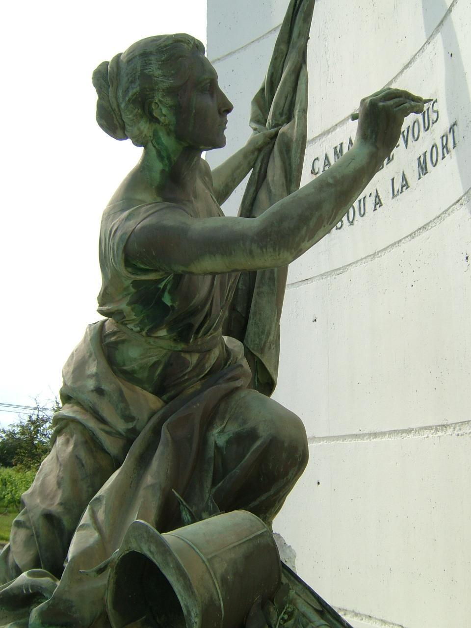 La figure de La France du Monument à Sidi-Brahim de Jules Dalou, érigé à Oran (Algérie) le 26 décembre 1898 pour commémorer la bataille de Sidi-Brahim (1845), transférée et remontée dans un nouveau monument à Périssac (Gironde) inauguré le 10 juillet 1966.